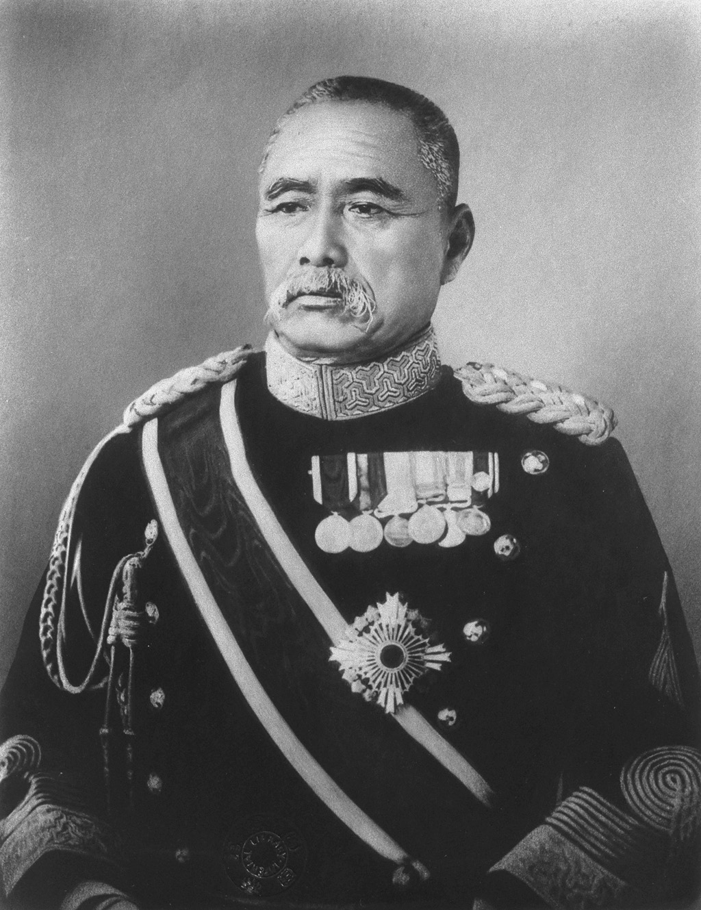 Portrait of Sakuma Samata (佐久間左馬太, 1844 – 1915)